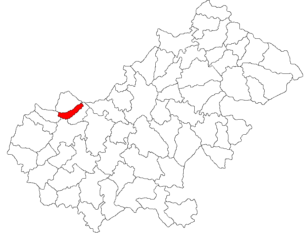 Categorie:Hărţi ale judeţului Satu Mare